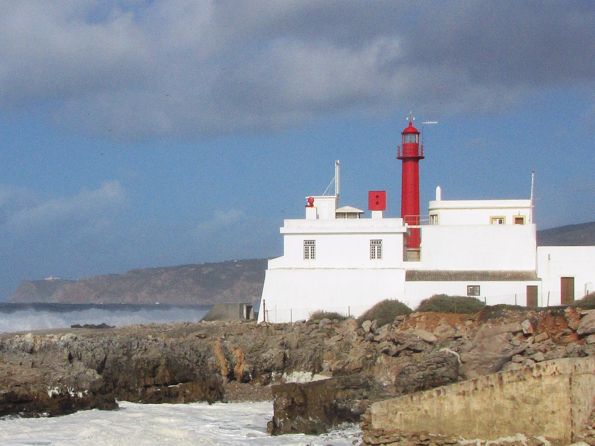 Leuchtturm Cabo Raso mit Festungsanlage am Parque Natural de Sintra-Cascais. Das Kap liegt südl. von Cabo da Roca, dem westl.Punkt des europ.Festlands. Cabo Raso an der N247 nahe Cascais Estoril Portugal - Foto 2010 Wolfgang Pehlemann Steinberg/Ostsee IMG_8590